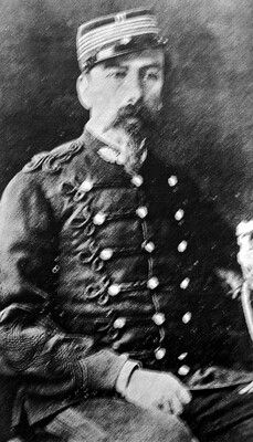 Tomás Yávar Ruíz, teniente coronel, comandante Granaderos a Caballo, muere en la batalla de Chorrillos, 1881